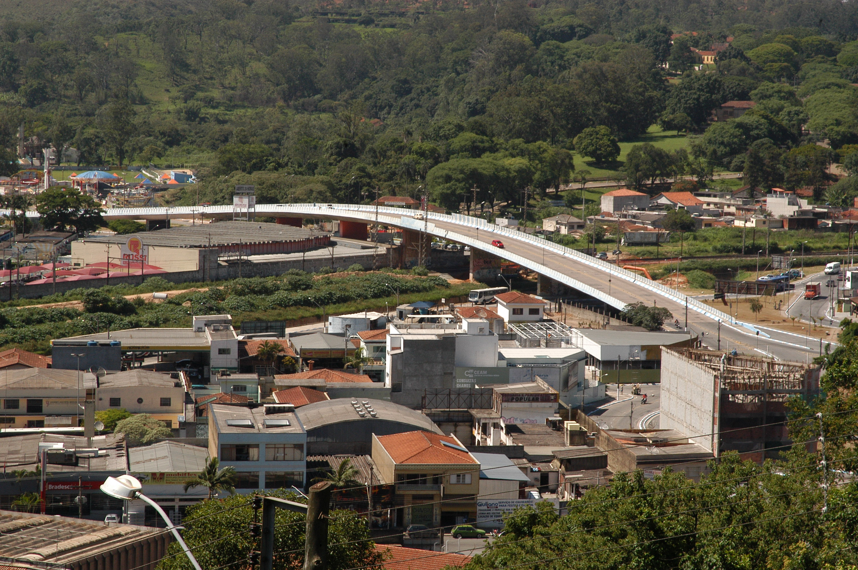 Viaduto Donald Savazoni, em Franco da Rocha.